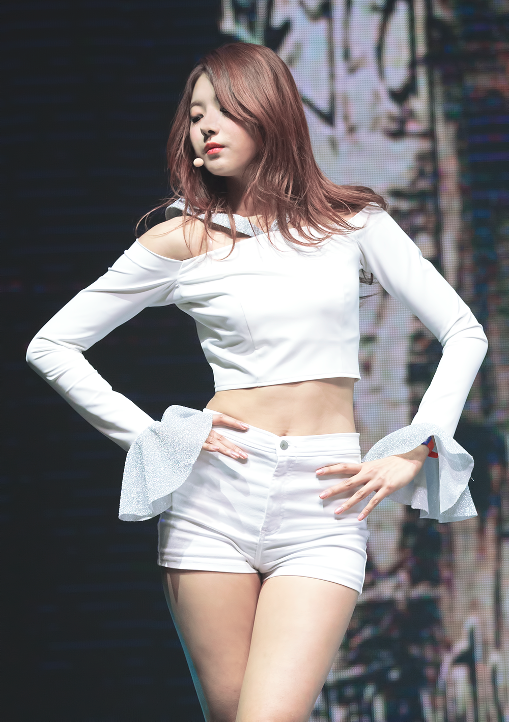 170322 프리스틴 쇼케이스